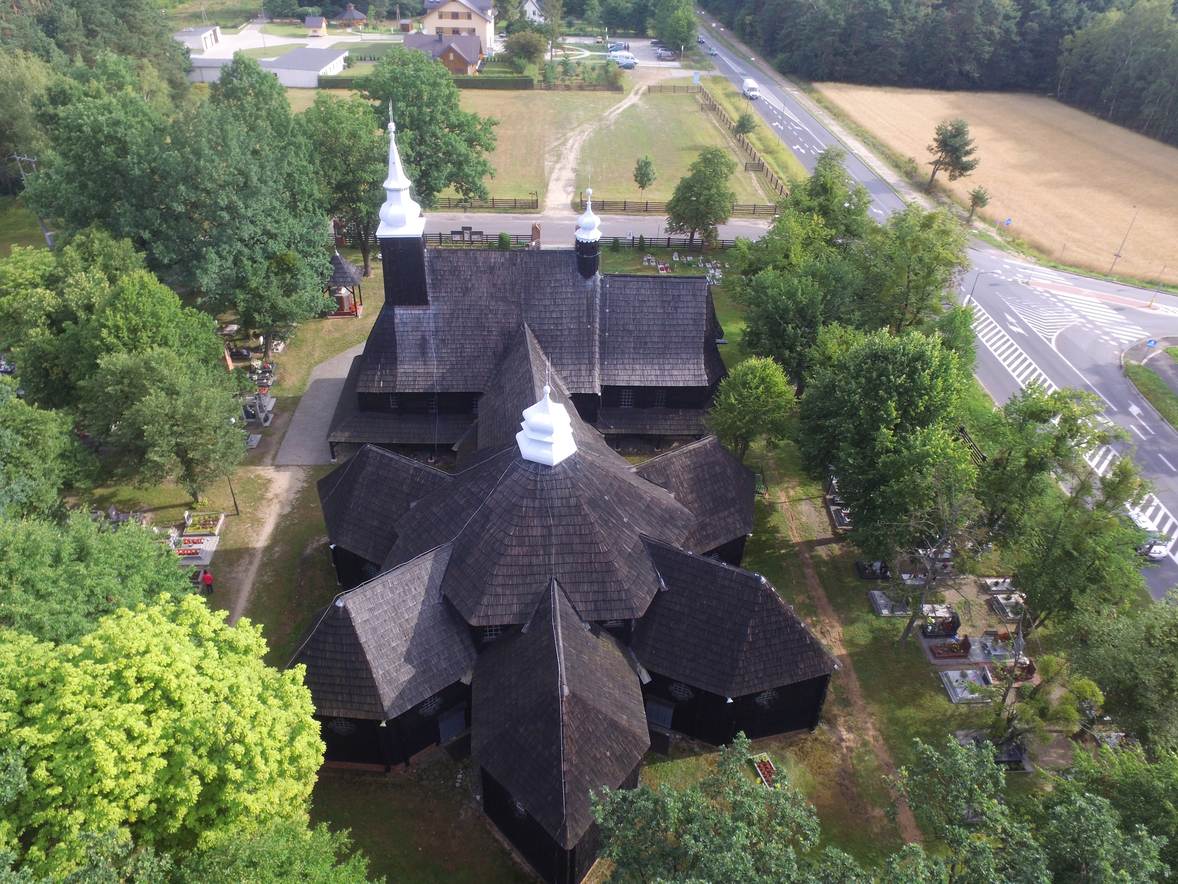 Kościół odpustowy pw. św. Anny w Oleśnie, widoczny układ kaplic w kształcie gwiazdy